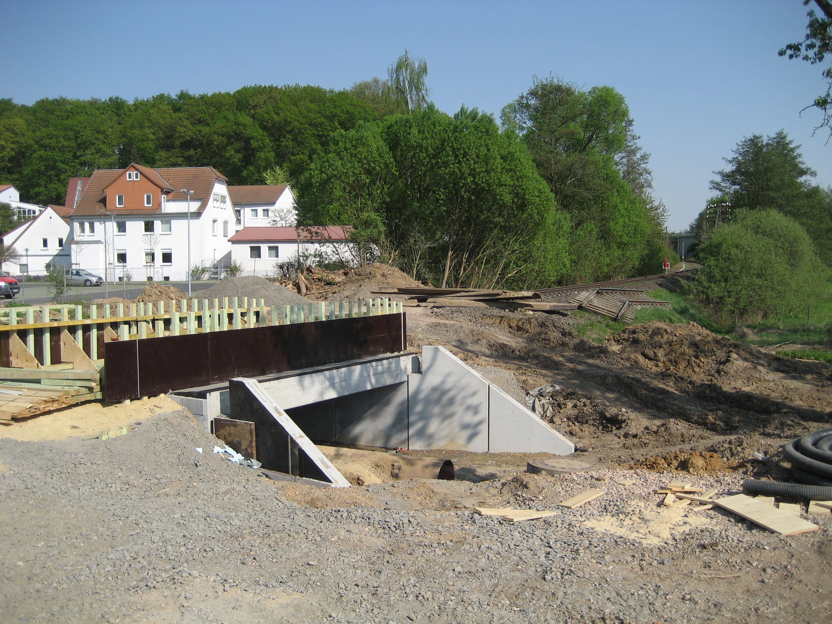 Neubau einer Brücke über die Wieseck beim Industriegebiet Buseck der Vogelsbergbahn (KBS 635)